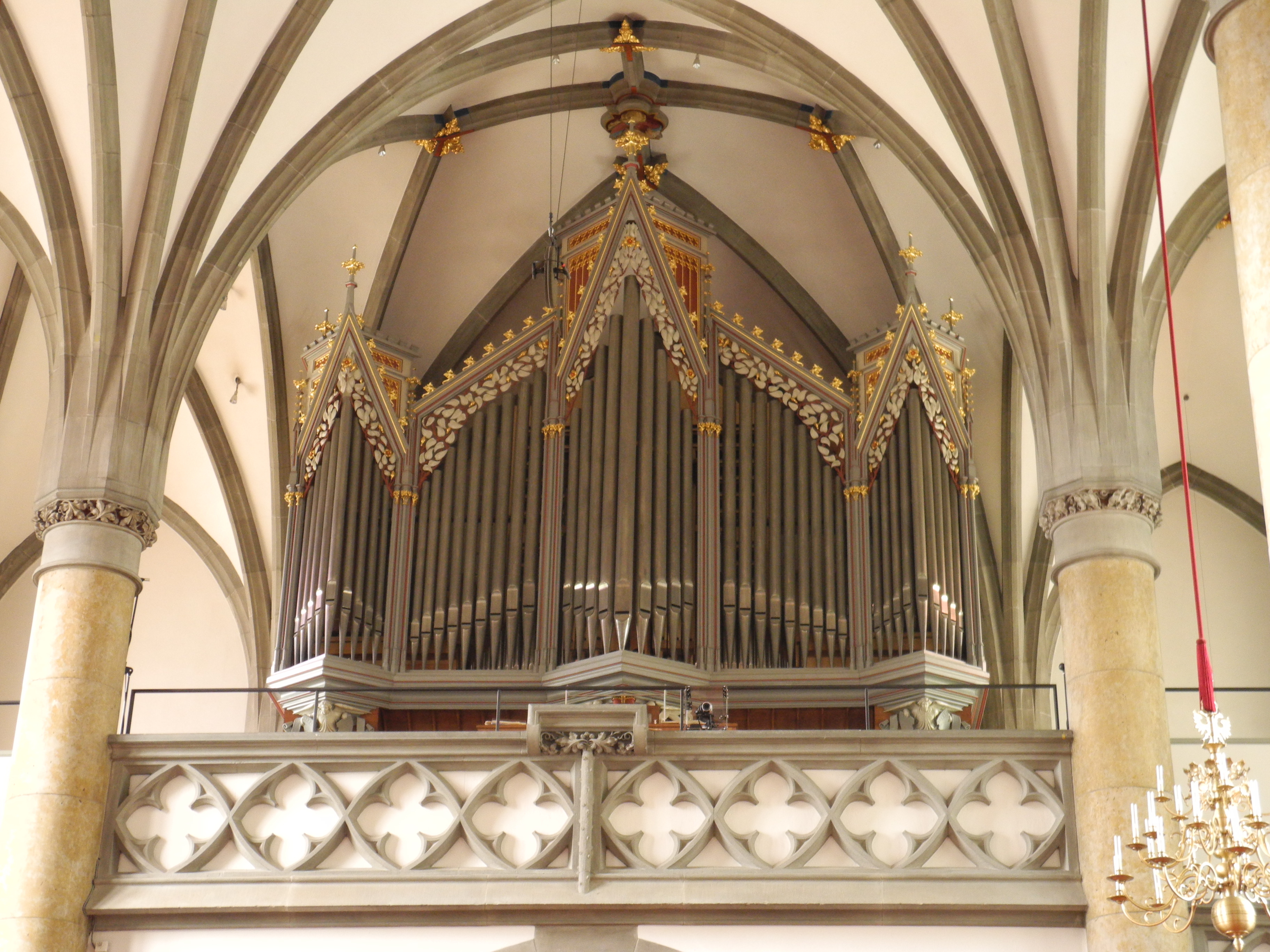 Steinmeyer 1874, Eule 2013